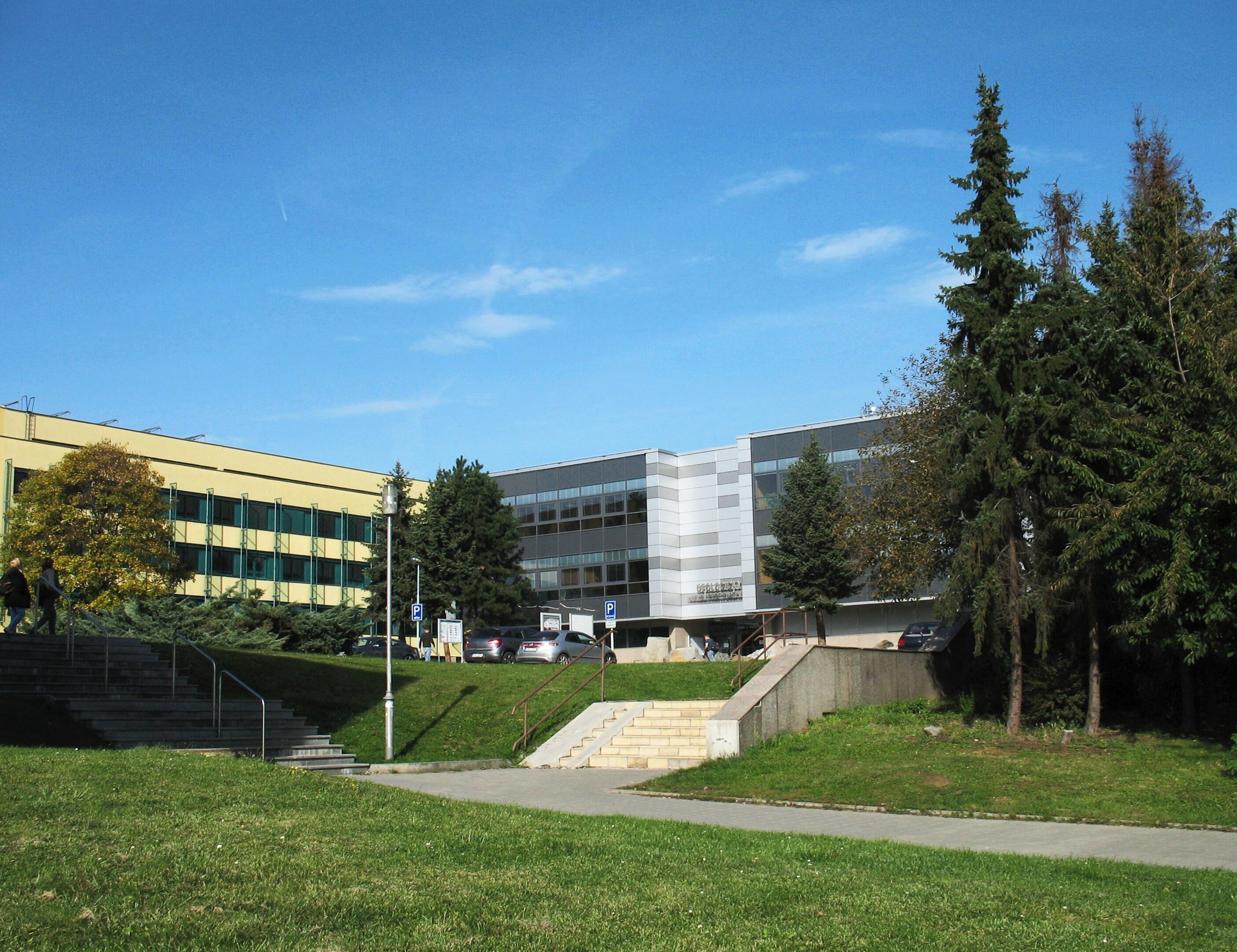 Geologický pavilon v areálu VŠB v Ostravě-Porubě